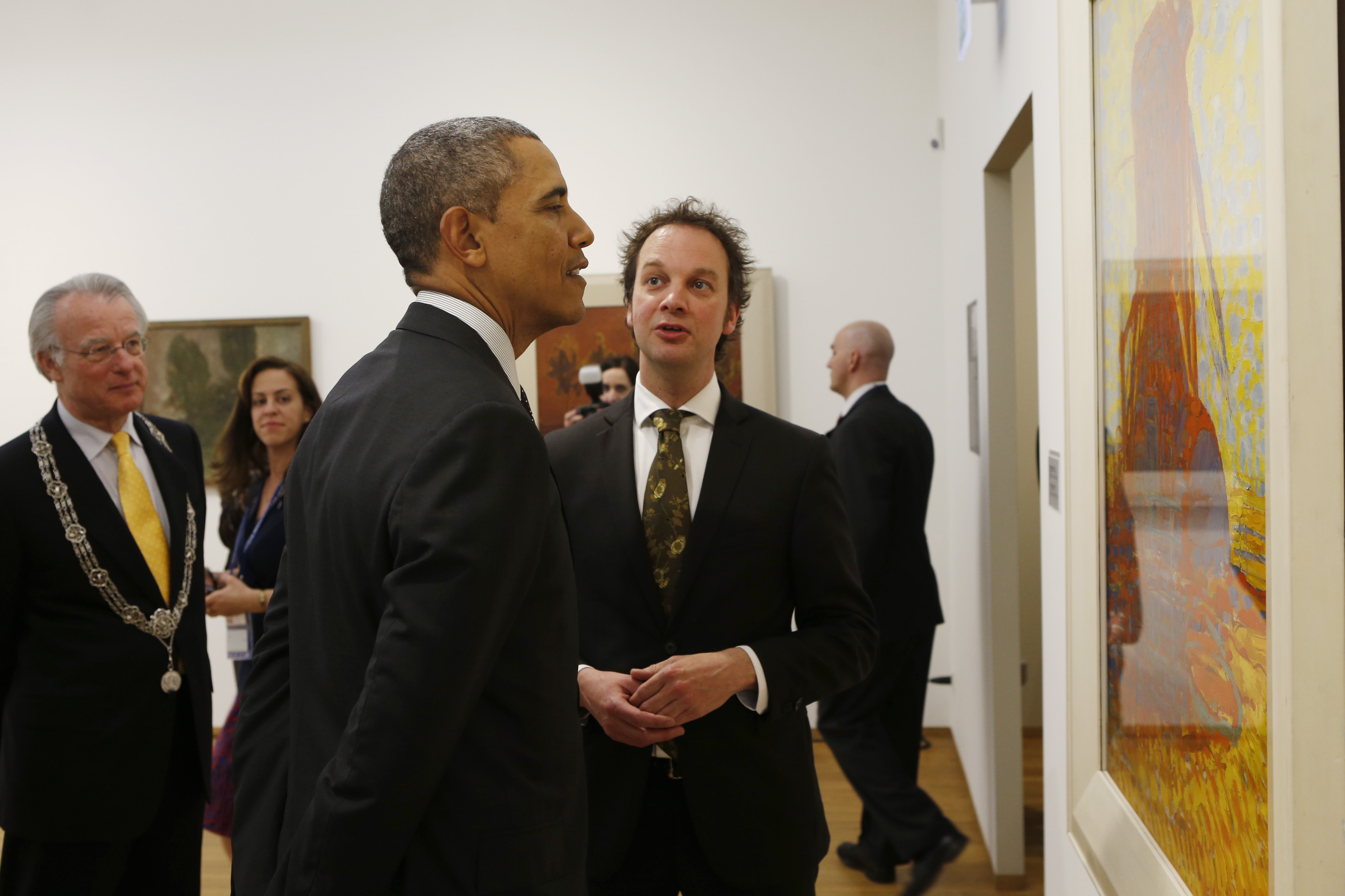 President Obama in het gemeentemuseum met Benno Tempel voorafgaand aan de afsluitende persconferentie.